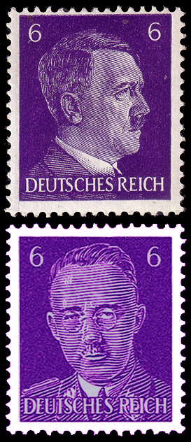 Почтовая марка Германии, Адольф Гитлер, и поддельная марка, Генрих Гиммлер, 1943 год.